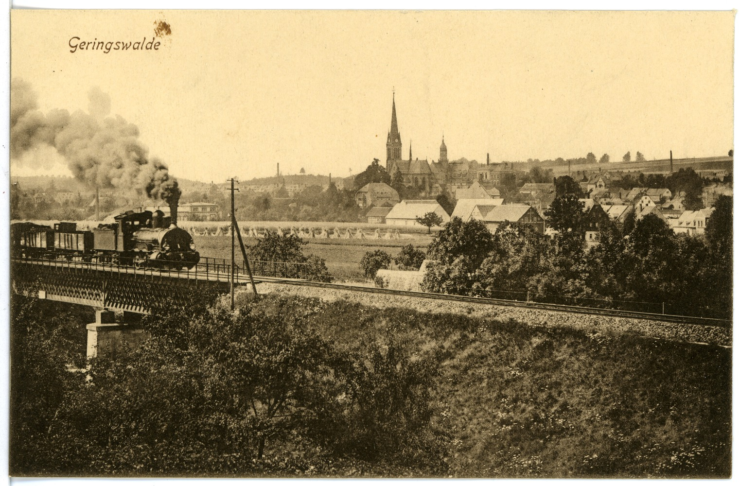 Blick auf Geringswalde - Eisenbahnbrücke mit Güterzug. This postcard is from publisher Brück & Sohn in Meißen ( This postcard has a unique number 16615 and is available in a higher resolution at the publisher. This images was uploaded in a cooperation project between Wikipedians and the publisher.